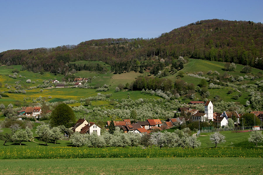 Oltingen